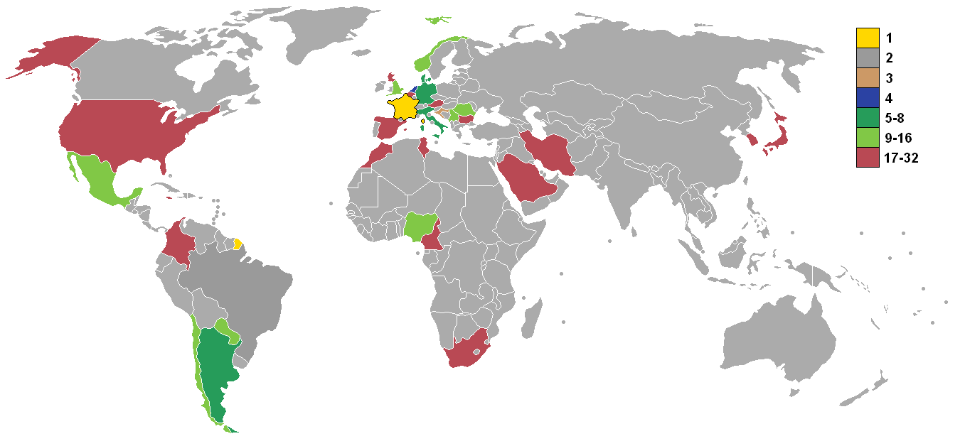 classement 1998